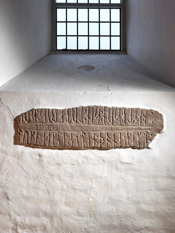 Foto af Roberto Fortuna